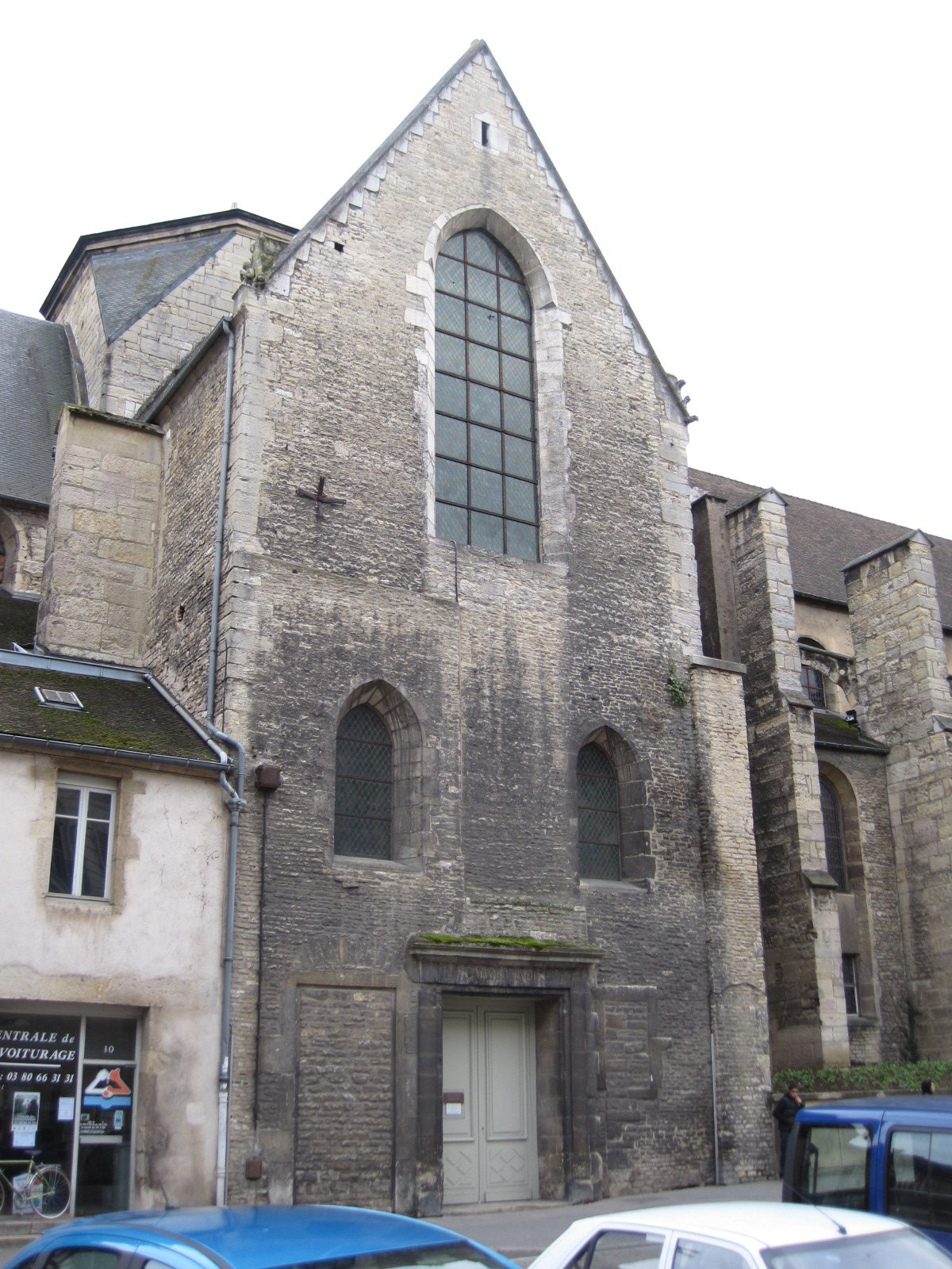 Musée François Rude de Dijon en Bourgogne